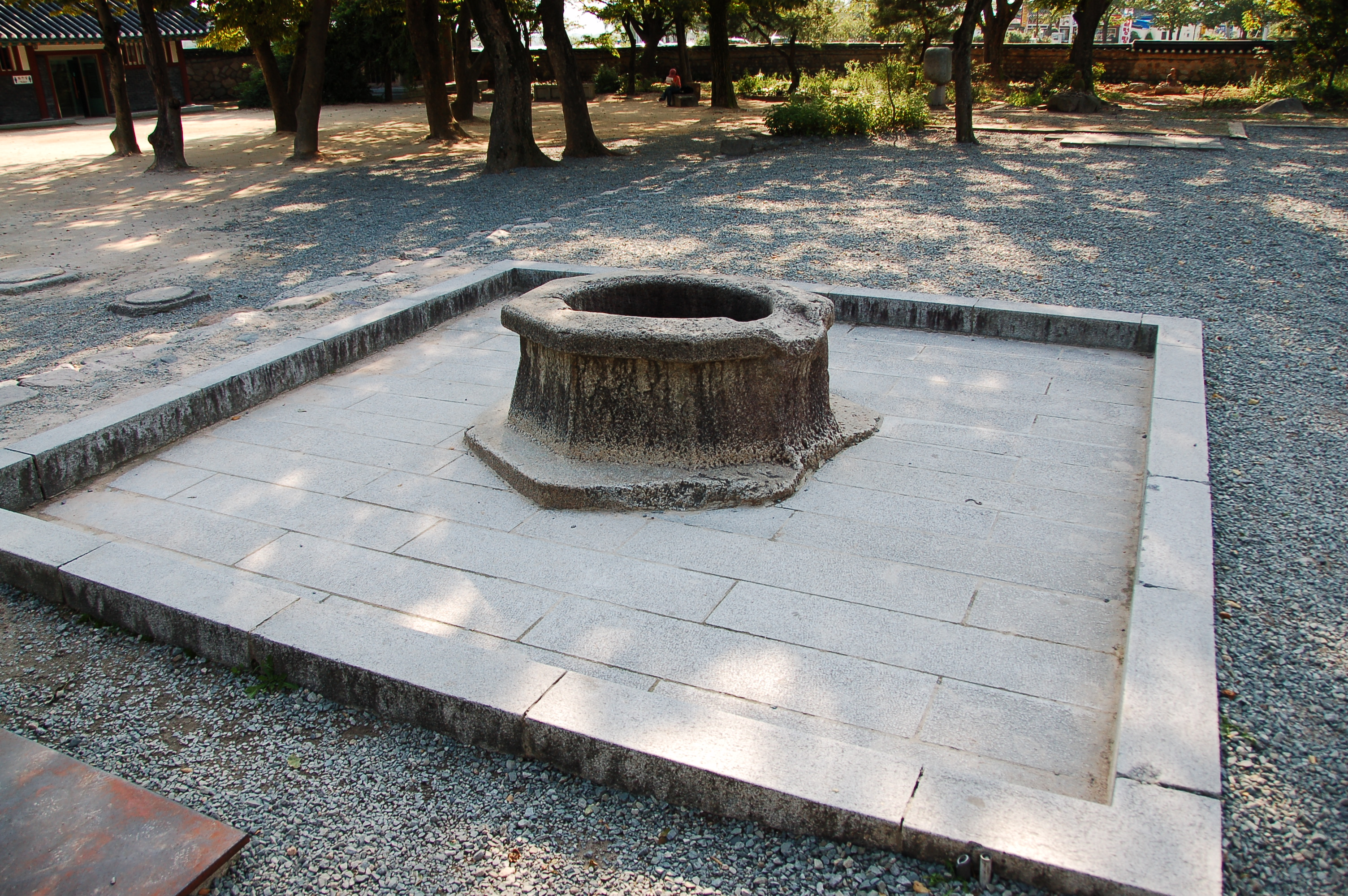 Well at Bunhwansa.